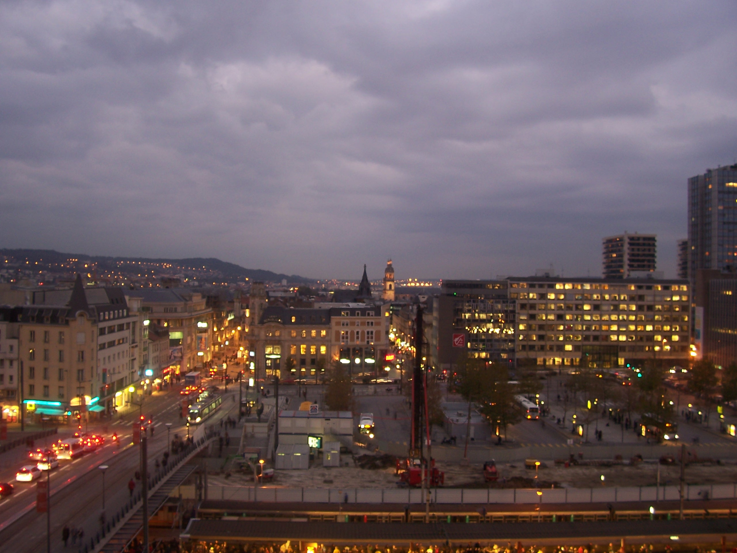 Vue sur la place de la république